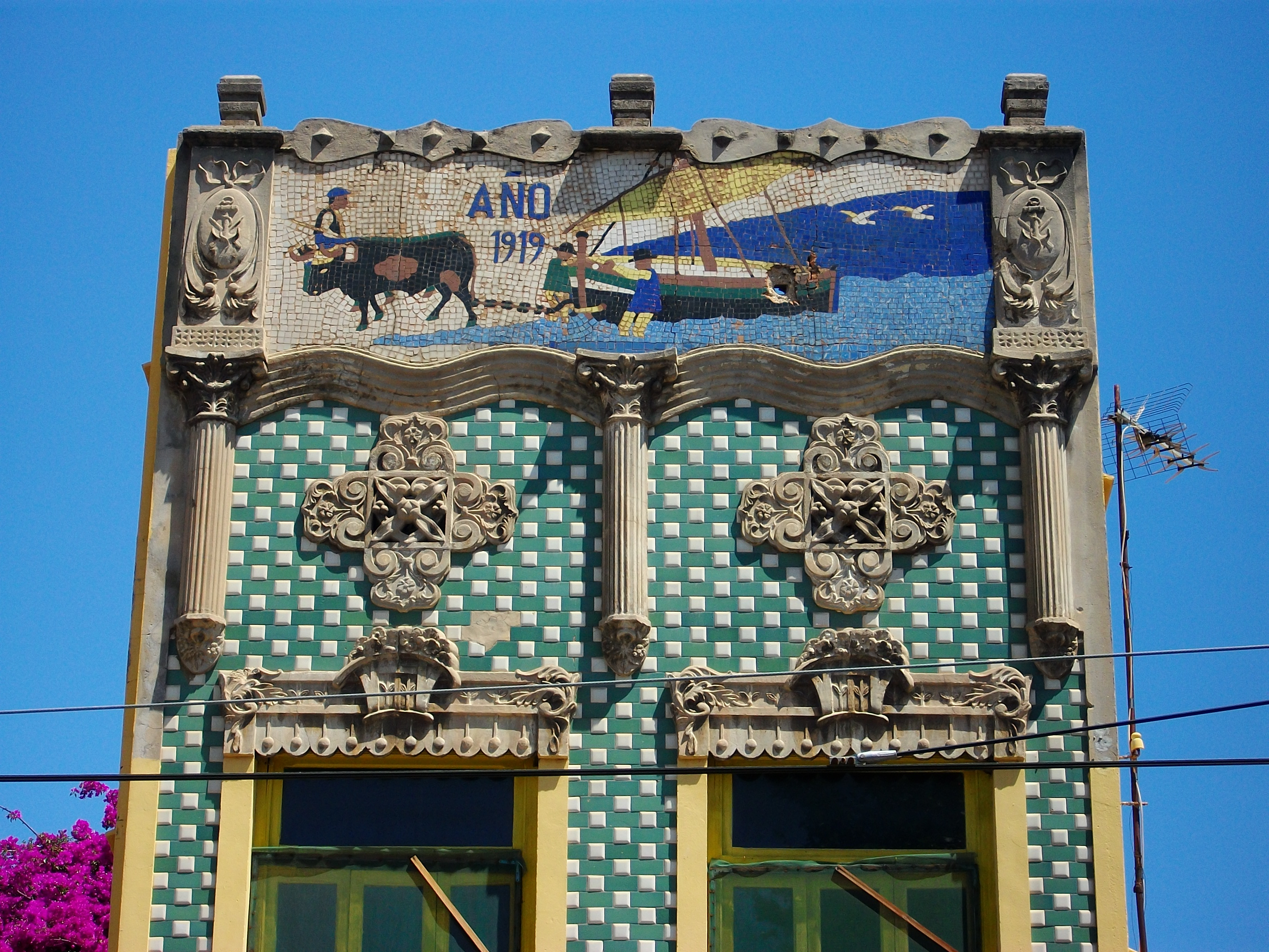 Casa al carrer del Mediterrani del Cabanyal.